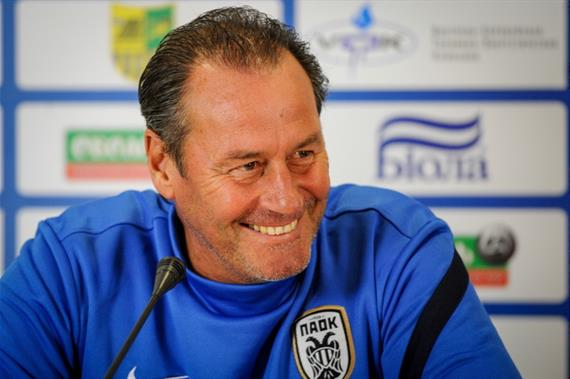 Губ Стевенс — нідерландський футбольний тренер під час керівництва ПАОКом